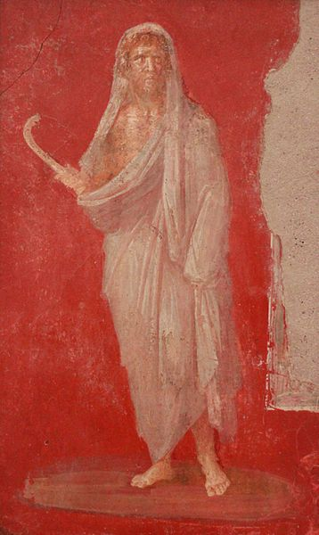 Saturno.